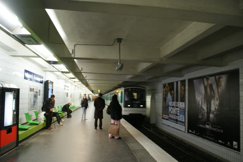 Andenes de la Estación Grands Boulevards